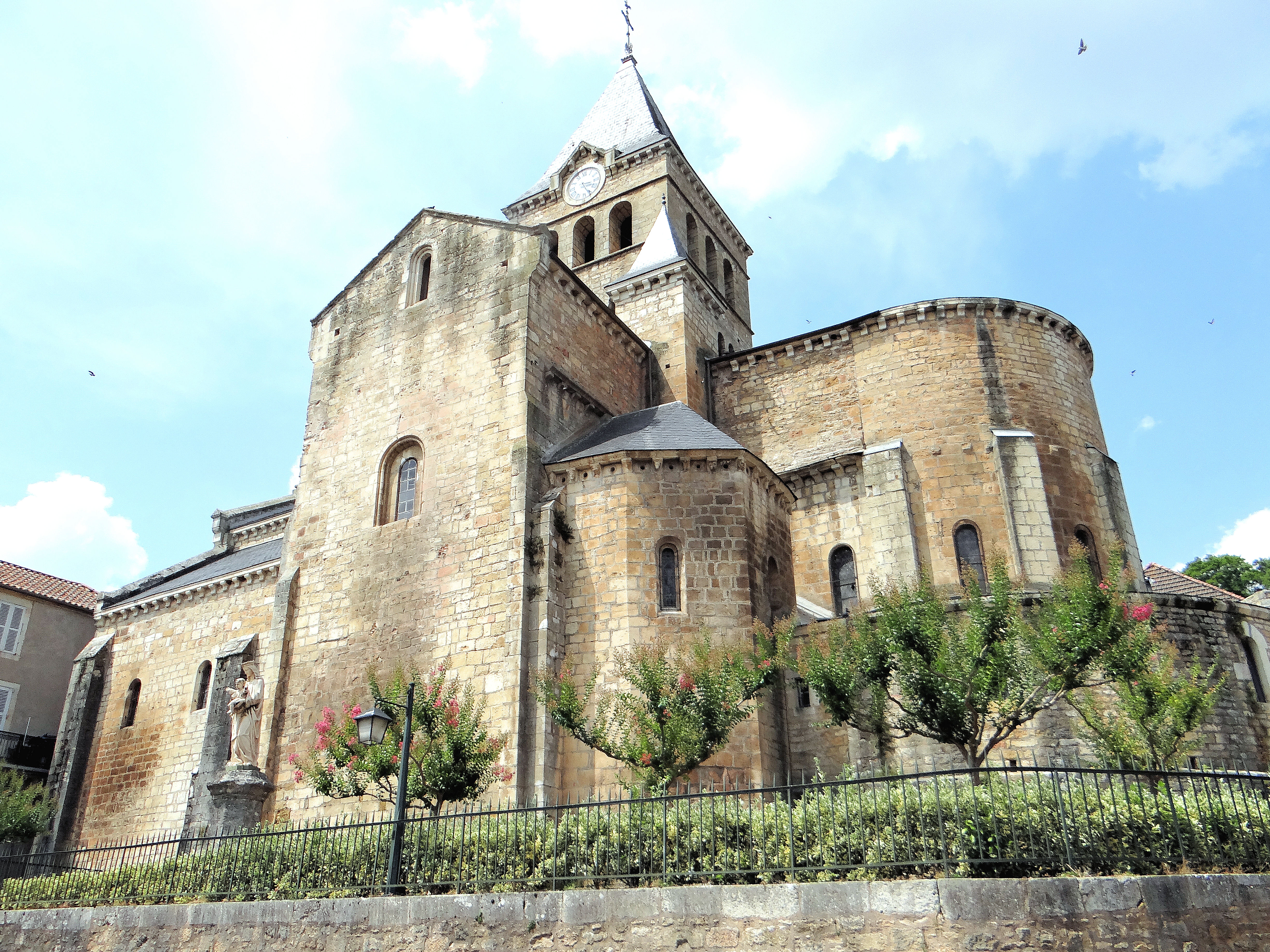 Vue extérieure